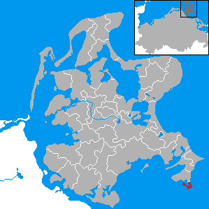 Thiessow, Landkreis Rügen, Mecklenburg-Vorpommern